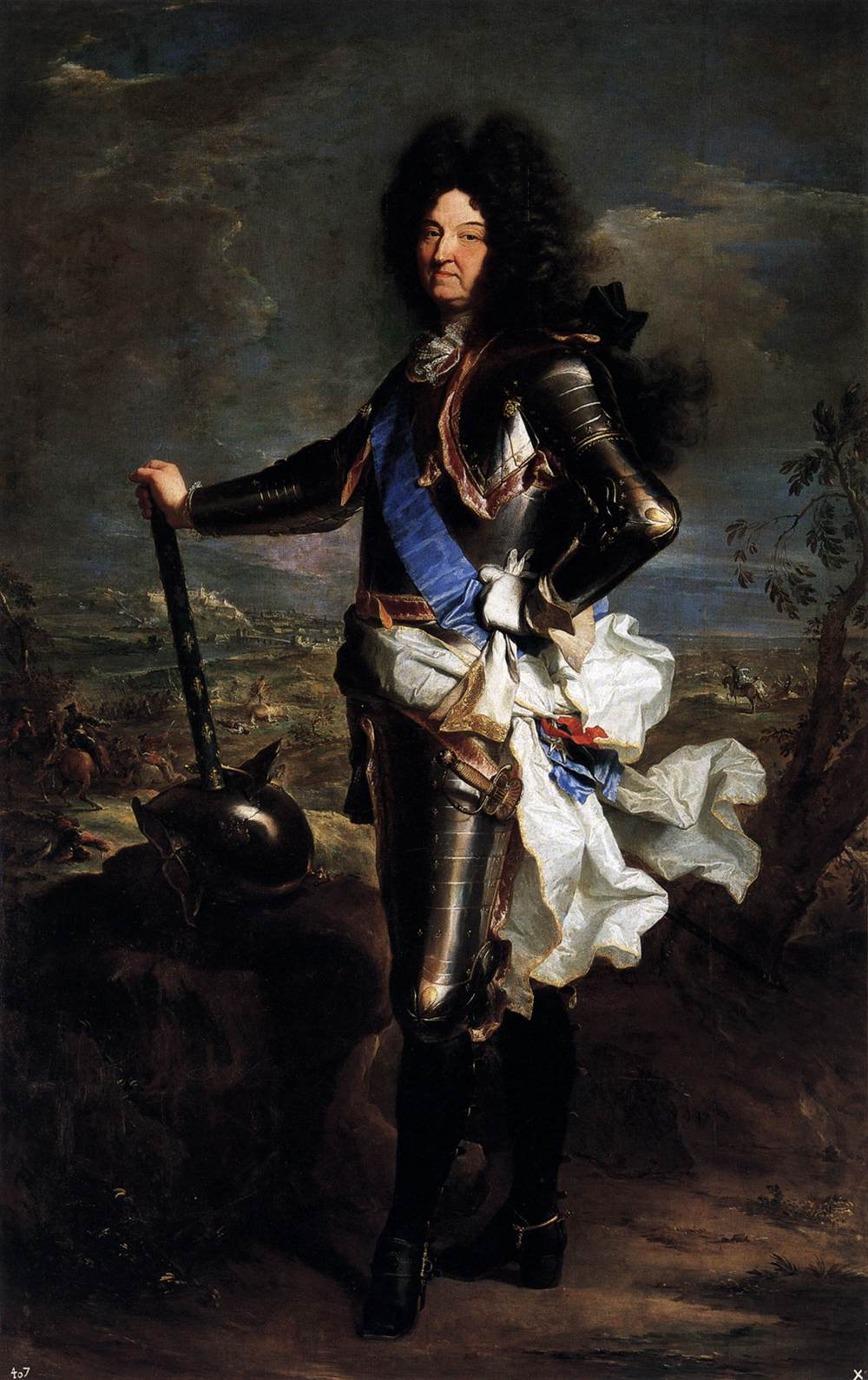 Retrato del rey Luis XIV de Francia (1638-1715), que fue hijo del rey Luis XIII de Francia y de la reina Ana de Austria. El monarca aparece de cuerpo entero, con armadura completa, delante de un campo de batalla, acentuando su aspecto militar. El bastón de mando, en el que se ven las flores de lis como símbolo heráldico de los Borbones y la banda azul de la Orden del Saint-Esprit completan la fuerte retórica de poder y majestad que se aprecia en el retrato. El lienzo, cuyo fondo de batalla está realizado por Joseph Parrocel (1646-1704), pertenece a una serie de retratos cortesanos que, pintados por Rigaud o Nicolas Largillierre, llegaron a España a principios del reinado de Felipe V como consecuencia de la implantación en España de la nueva dinastía borbónica. Rigaud parte del modelo del retrato en el exterior, popularizado por Van Dyck tiempo atrás. Muestra gran interés por las actitudes, la meticulosa representación de las calidades de telas y objetos, la evidente suntuosidad y la riqueza de la composición. El artista, junto con un amplio taller, logra plasmar en sus retratos de manera perfecta la relevancia de los personajes. Aquí muestra al Rey Sol en el apogeo de su fuerza, distante, poderoso y seguro de sí mismo, en una pintura realizada en las fechas que luchaba por mantener a su nieto Felipe V en el trono español.